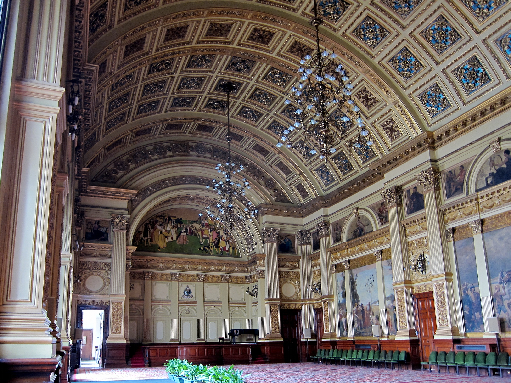 Salon de réception de l'hôtel de ville de Glasgow (Ecosse).